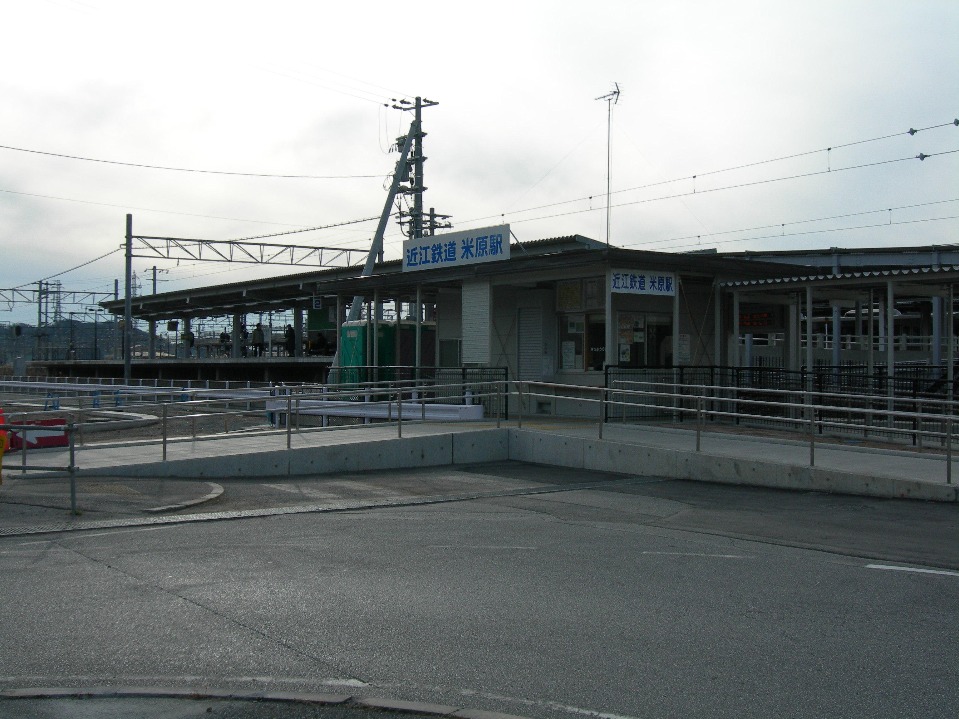 近江鉄道米原駅